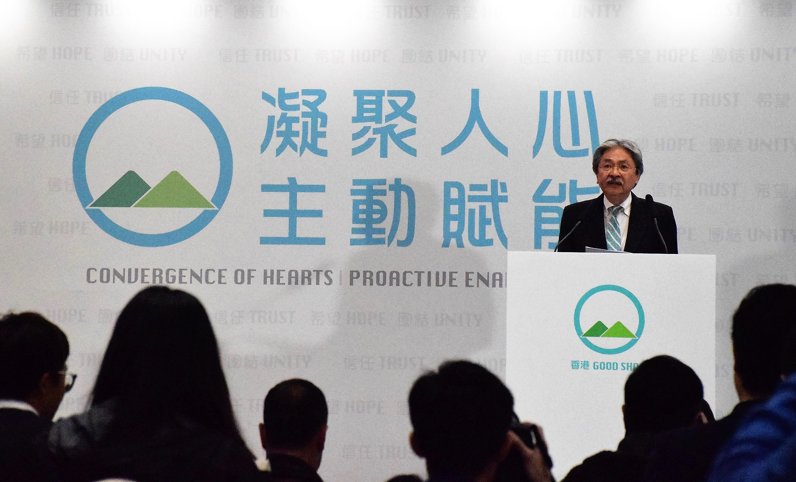 中文（香港）: 香港特首選舉曾俊華公佈競選政綱。